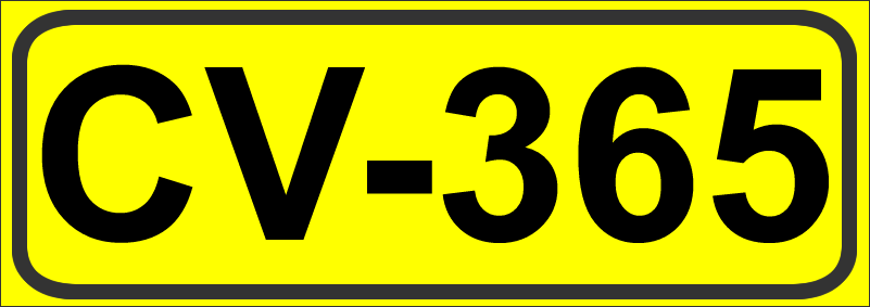 nidcador de la Carretera de la Comunidad Valenciana CV-365